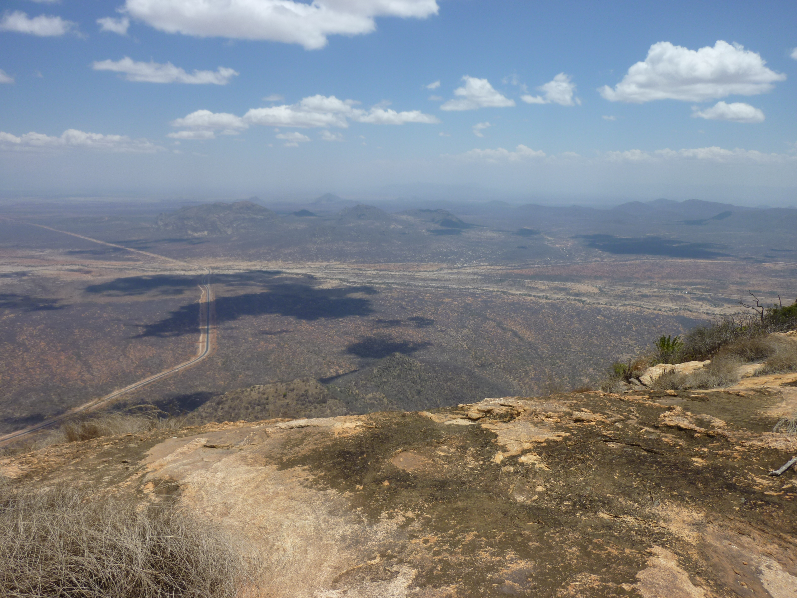 Empty Marsabit-Moyale Rd.